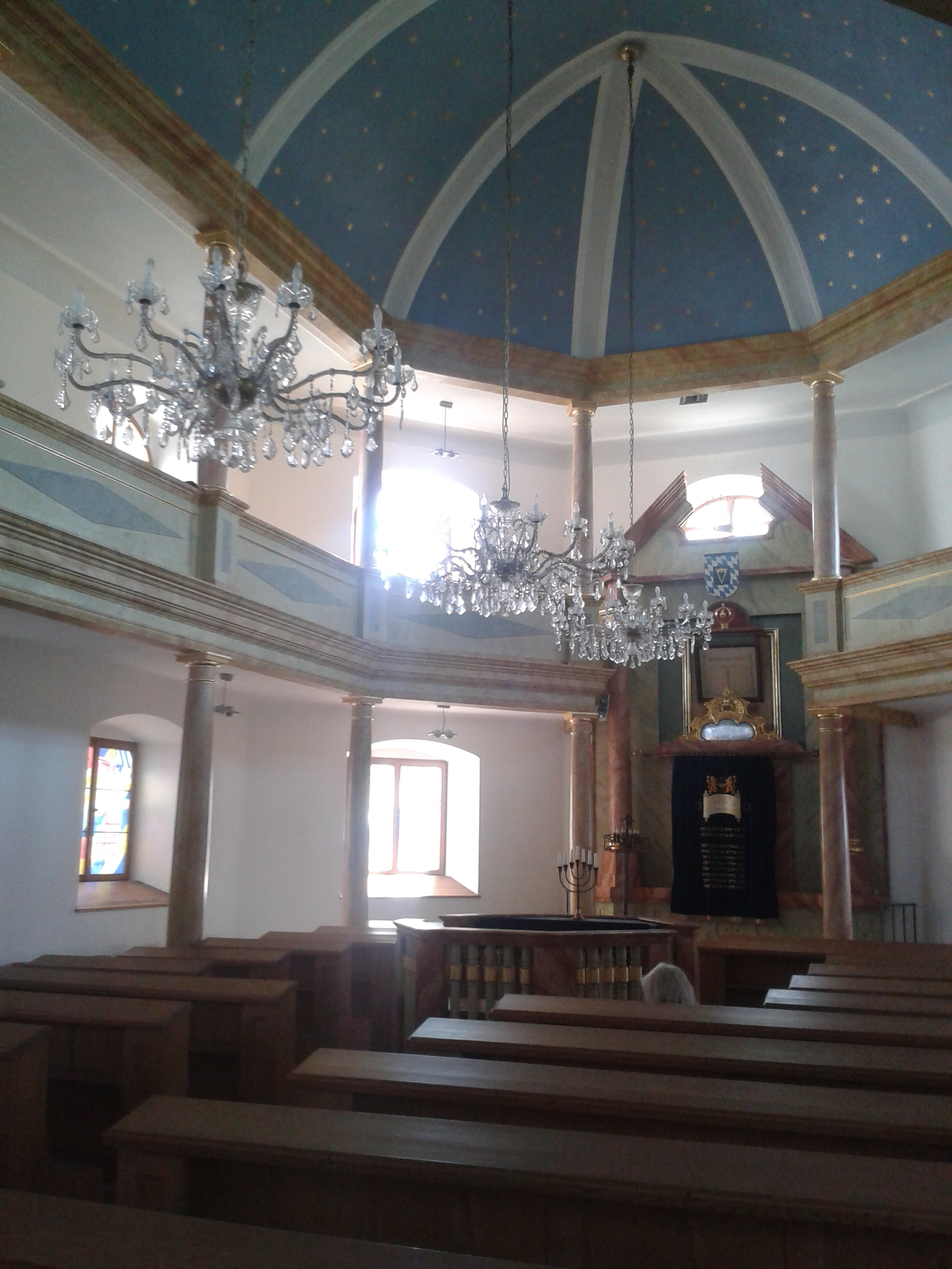 Innenraum der Floßer Synagoge im August 2014